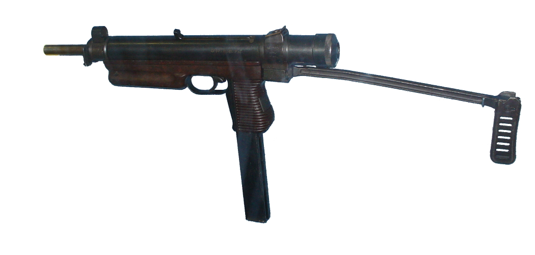 Samopal Vz.25, Czech submachine gun